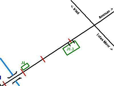 Schematische Darstellung der jordanischen Seite der Allenby-Brücke